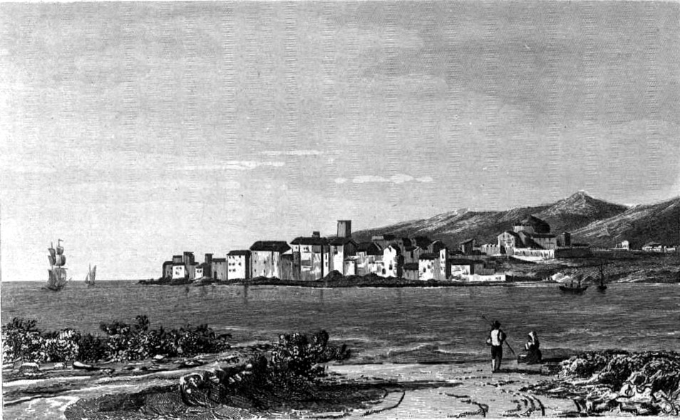 Image en provenance du livre : Eusèbe Girault de Saint-Fargeau, Guide pittoresque du voyageur en France, contenant la statistique et la description complète des quatre-vingt-six départements, orné de 740 vignettes et portraits gravés sur acier, de quatre-vingt-six cartes de départements et d'une grande carte routière de la France, par une Société de gens de lettres, de géographes et d'artistes, Paris, F. Didot frères, 1838, 6 volumes in-8° (BNF : 8-L25- 46). Volume III Didot frères, 1838. Route de Paris à Nice traversant les départements de l'Isère, des Hautes-Alpes, des Basses-Alpes et du Var. auteurs dessins : Rauch (ou autre) auteurs gravures : Skelton fils, Schroeder, Bishop (ou autre)